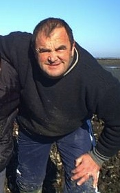 Philippe Gilibert, ancien joueur du CA Briviste